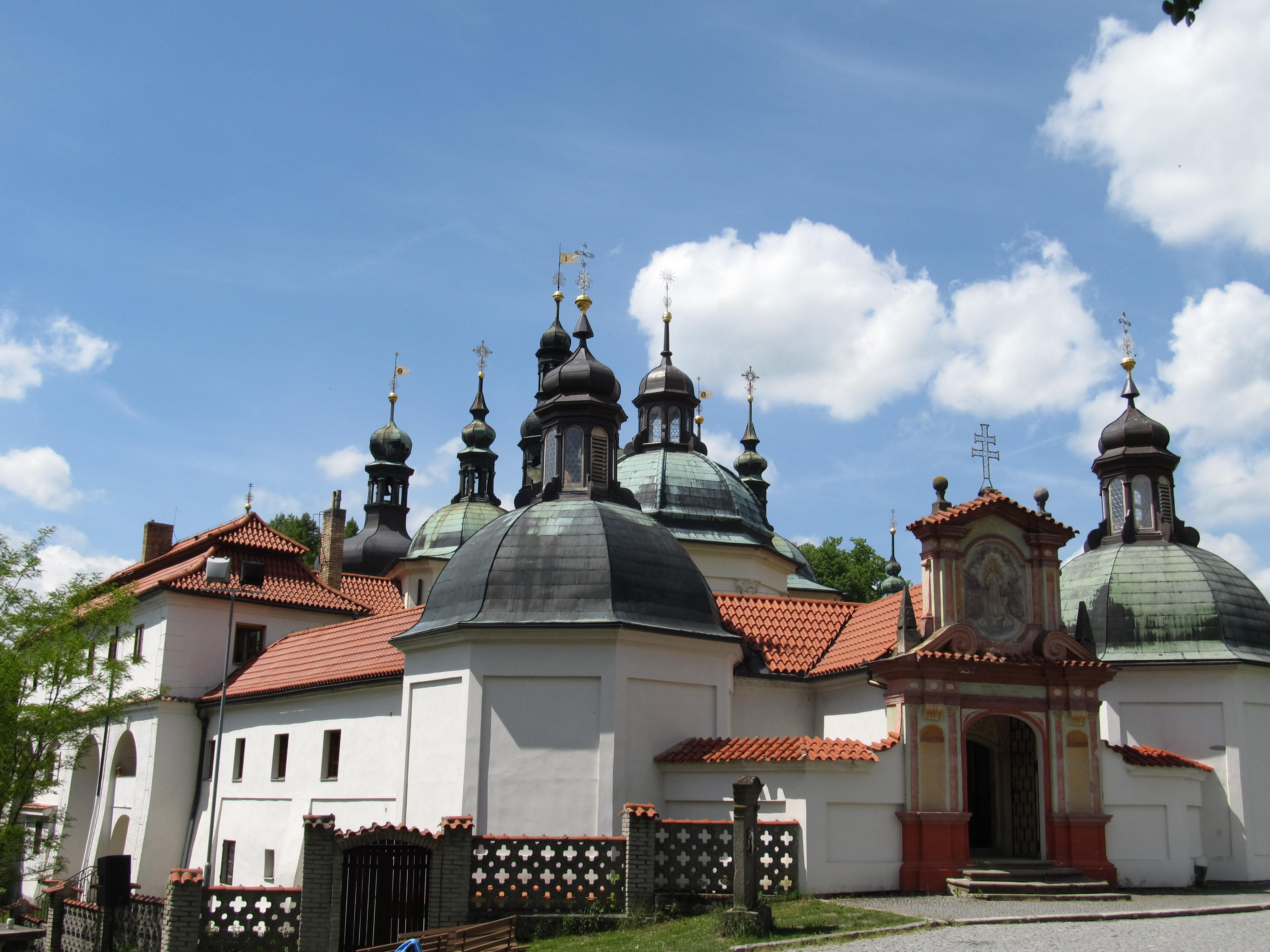 Poutní chrám Nanebevzetí Panny Marie